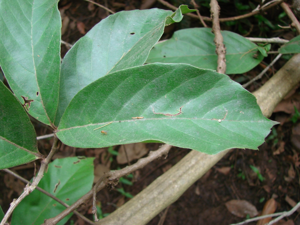 Doliocarpus brevipedicellatus Garcke - DILLENIACEAE - Parque Ecológico dos Jequitibás - Sobradinho - Distrito Federal - Brasil.